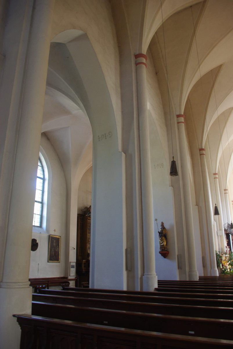 Säulen, Kirche St. Zeno (Bad Reichenhall)